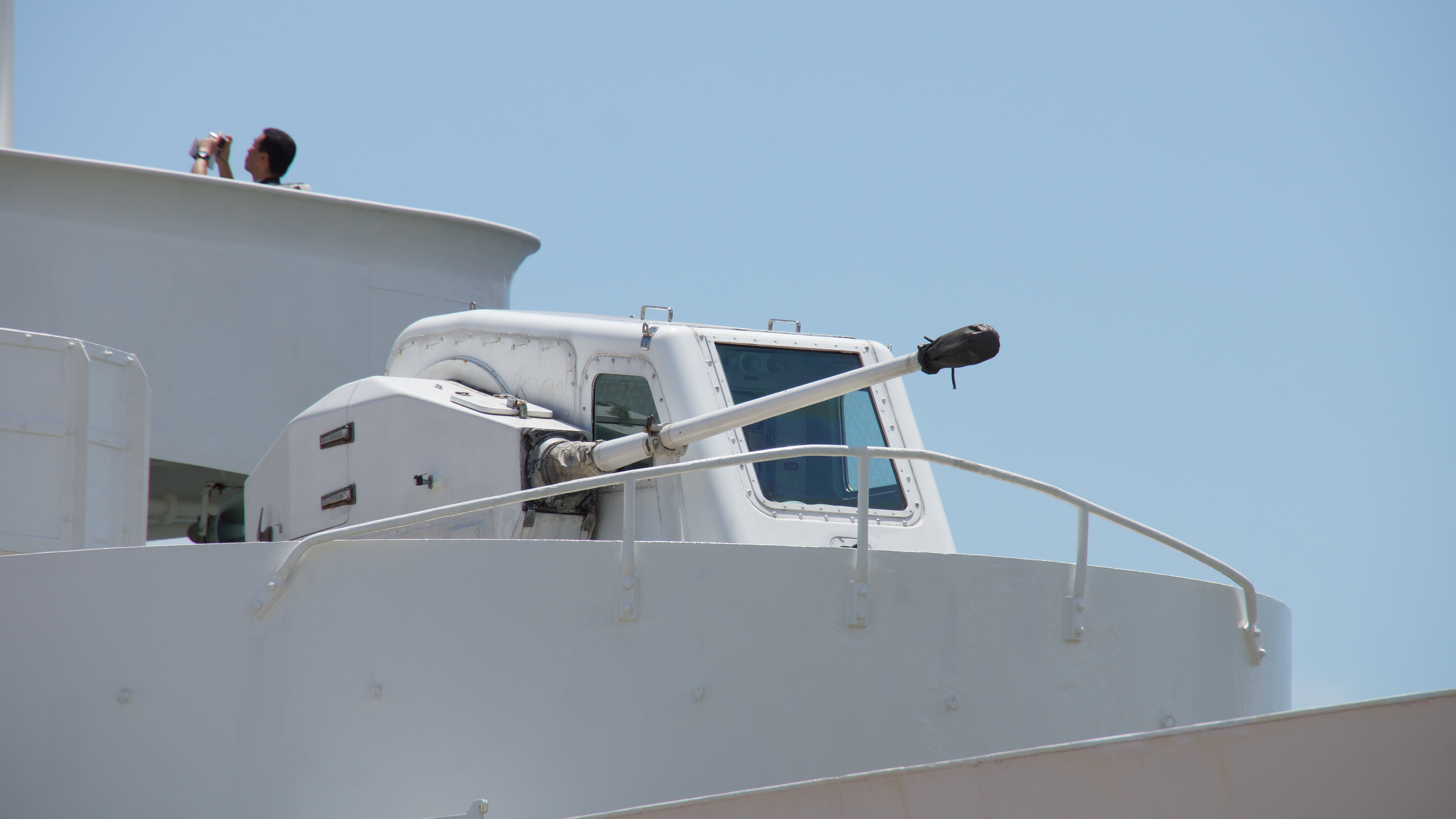 海上保安庁 ヘリコプター1機搭載型巡視船せっつ（PLH-07） 船首前方のエリコン35mm機関砲 左舷前面。2017年7月22日 神戸港にて。